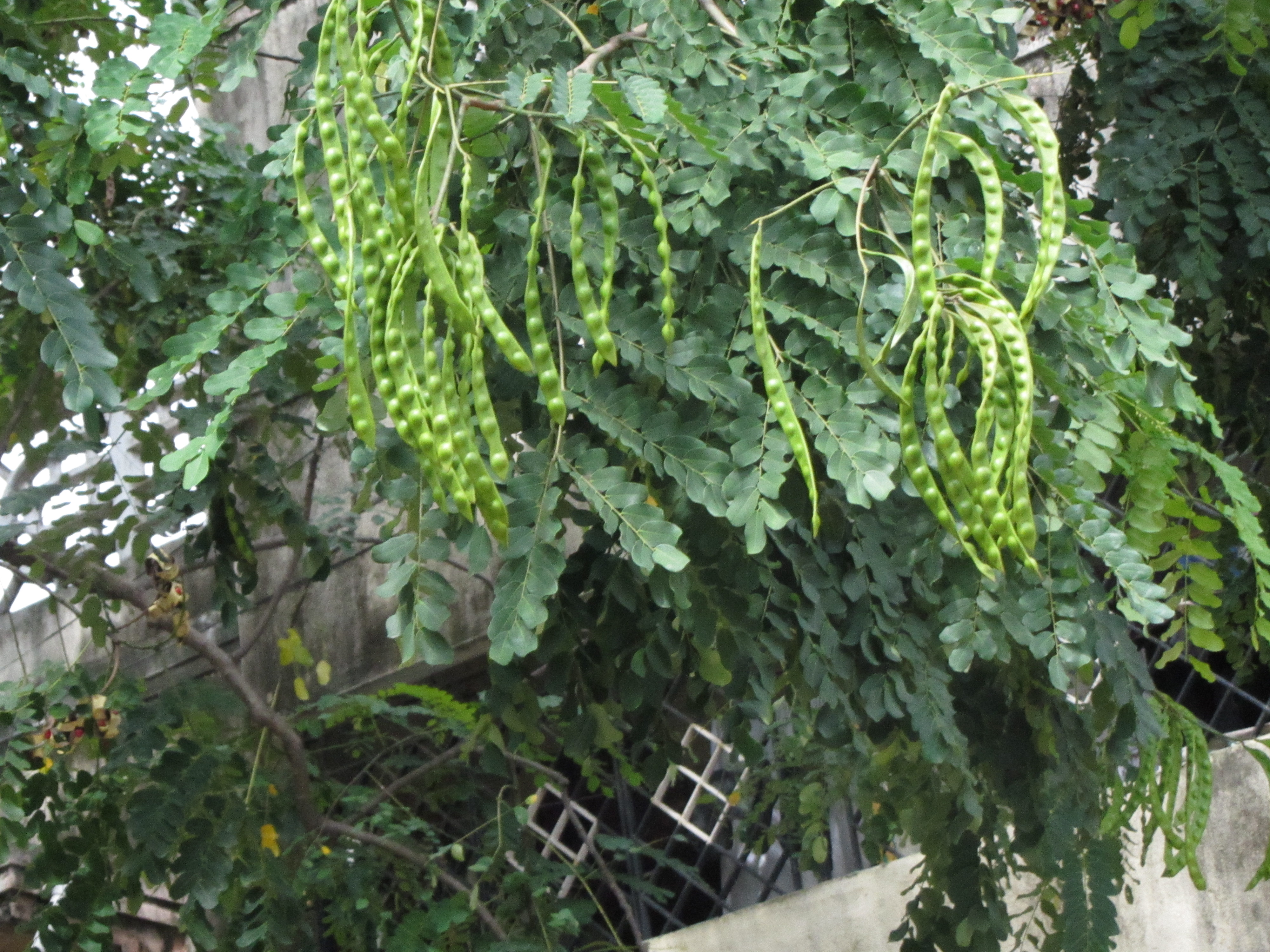 own creation - காய்த்துக் குலுங்கும் சே மரம், செம்மரம், ரோட்டுசெம்மை மரம் (Soymida febrifuga)